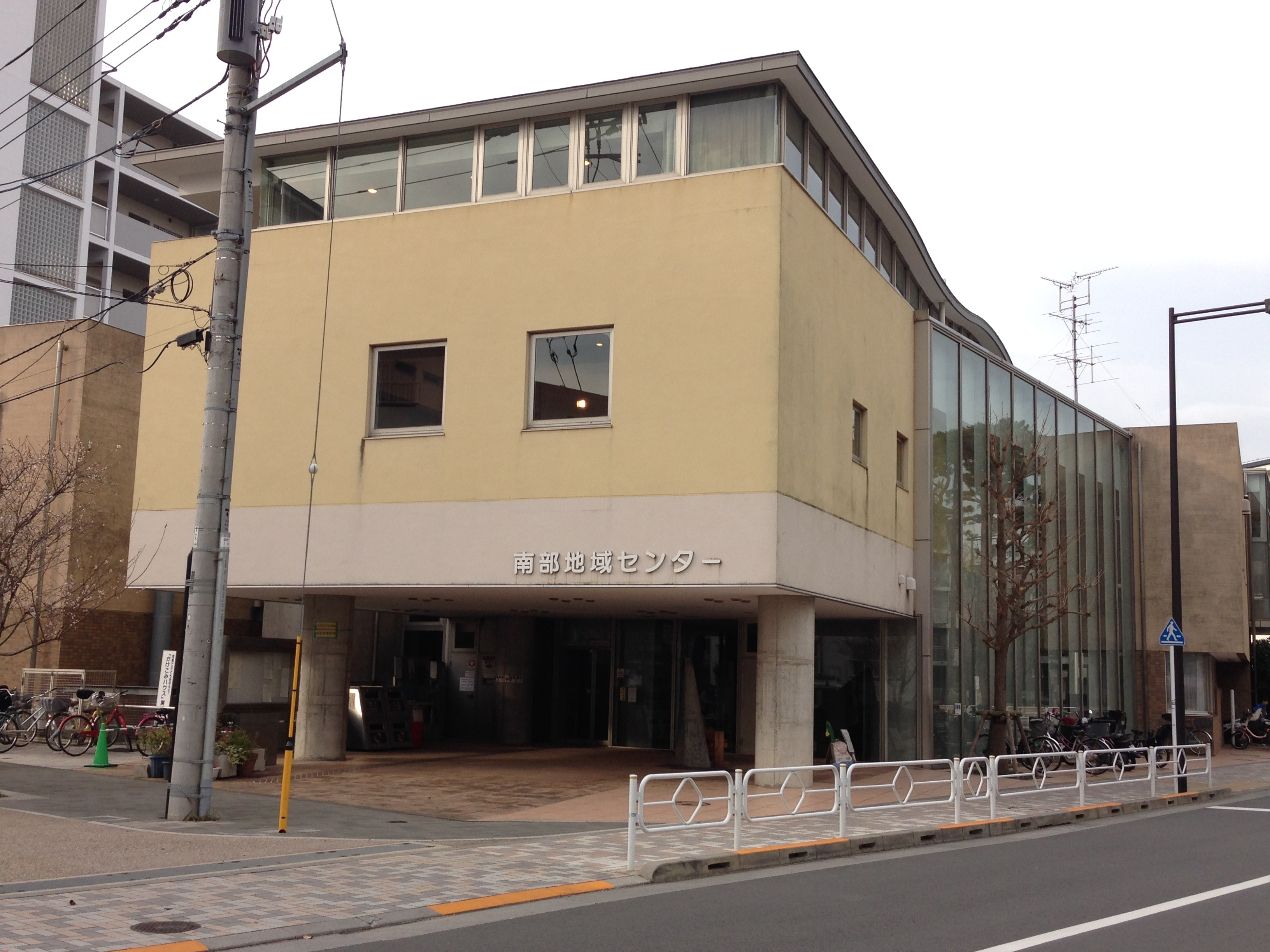 南部地域センター入口側外観（東京都東久留米市）